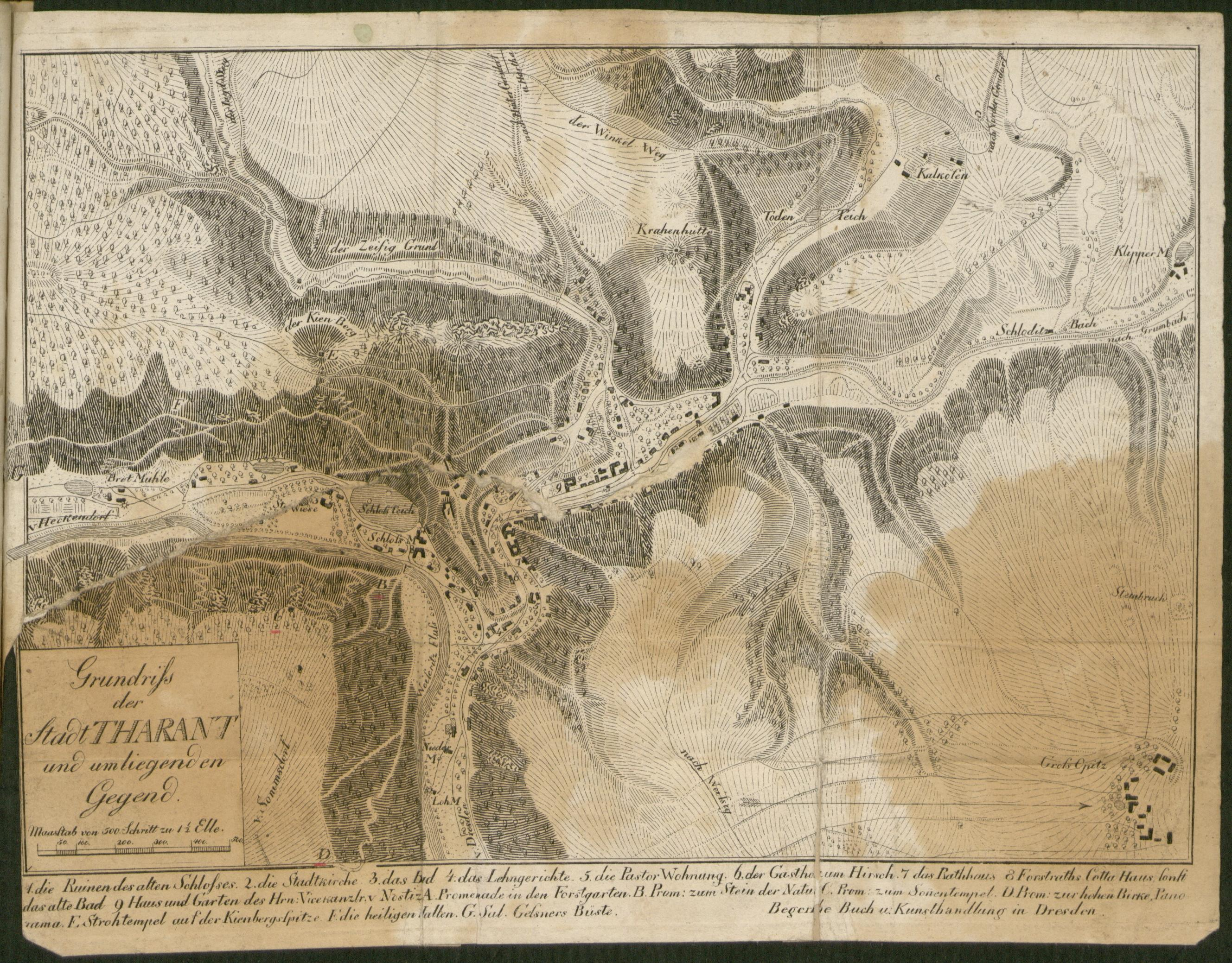 Beschreibung des Plauenschen Grundes, des Badeorts Tharant und seiner Umgebungen, ein kurzer unterhaltender Wegweiser für Naturfreunde, welche diese Gegenden genußvoll besuchen und angenehme Erinnerungen davon behalten wollen.